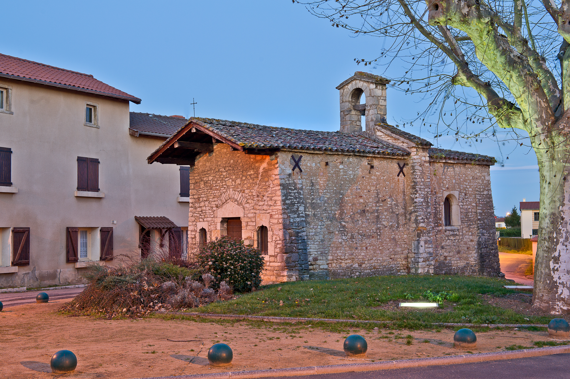 Chapelle Saint-Jean-Baptiste de La Chapelle, (Inscrit, 1983) .